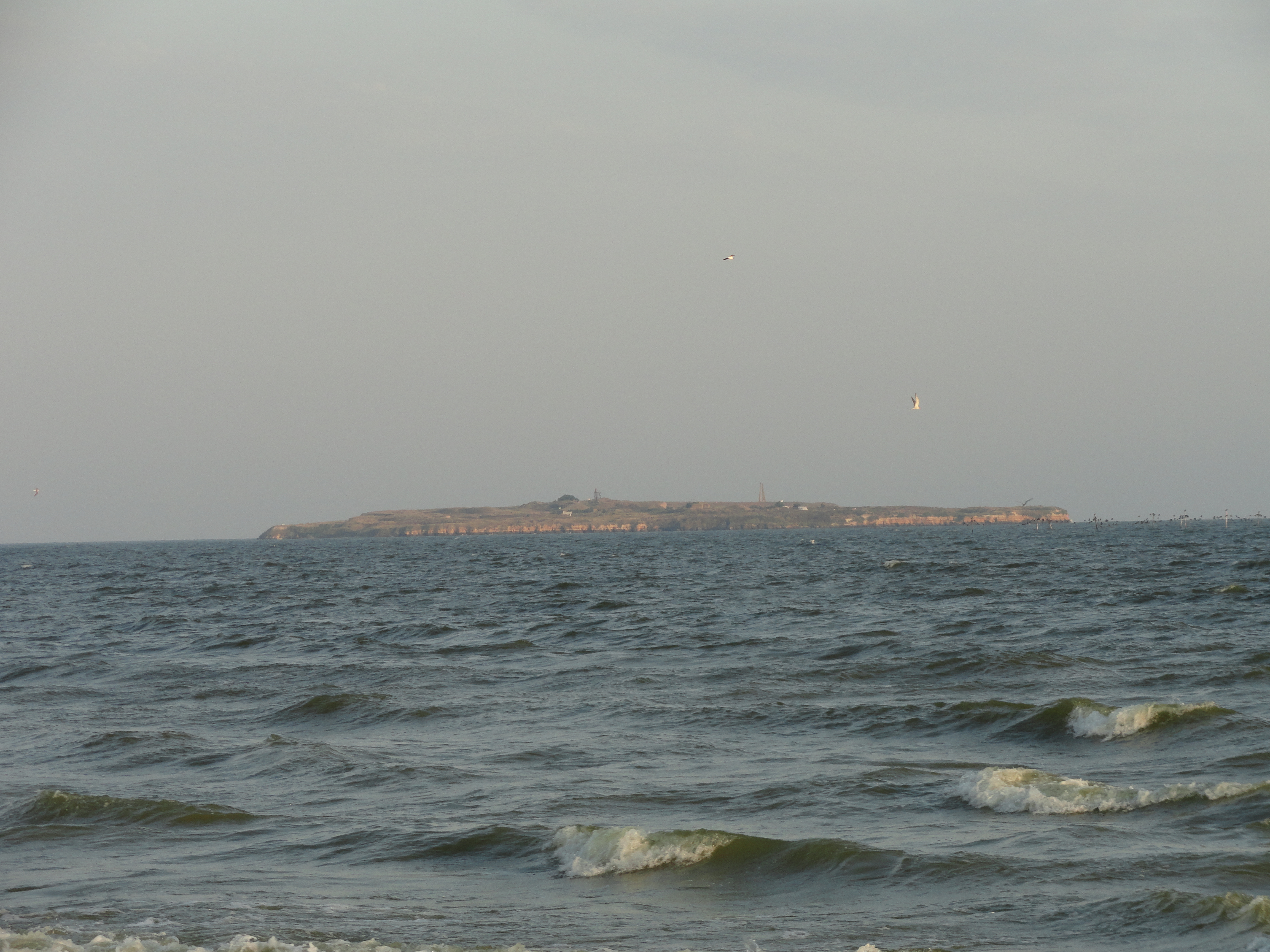 Остров Березань. Вид с пляжа Рыбаковка